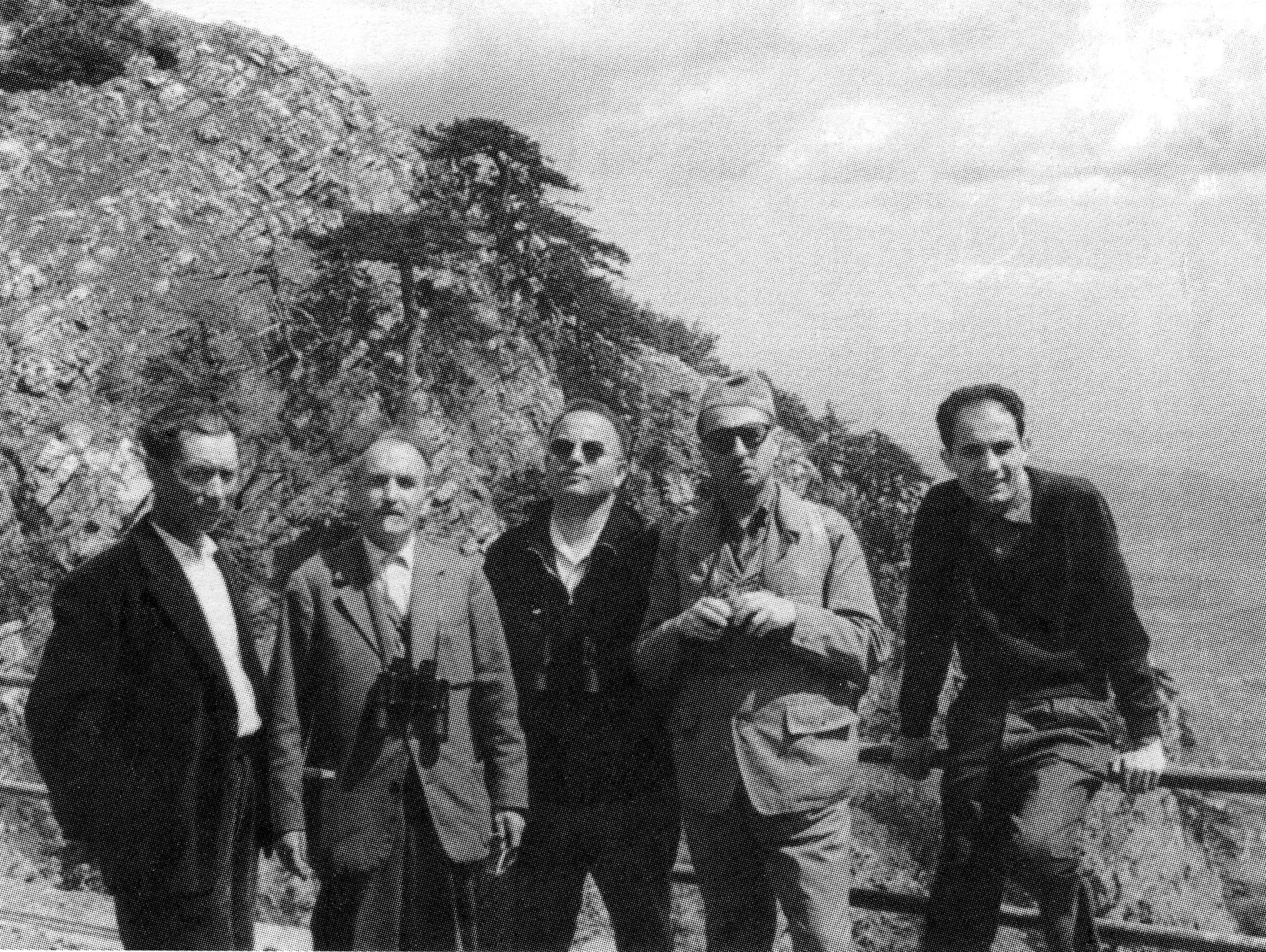 Elio Augusto Di Carlo (al centro) nell'escursione sul monte Pollino con il prof.Moltoni, l'avv.Sevesi e il dr.Incoronato.